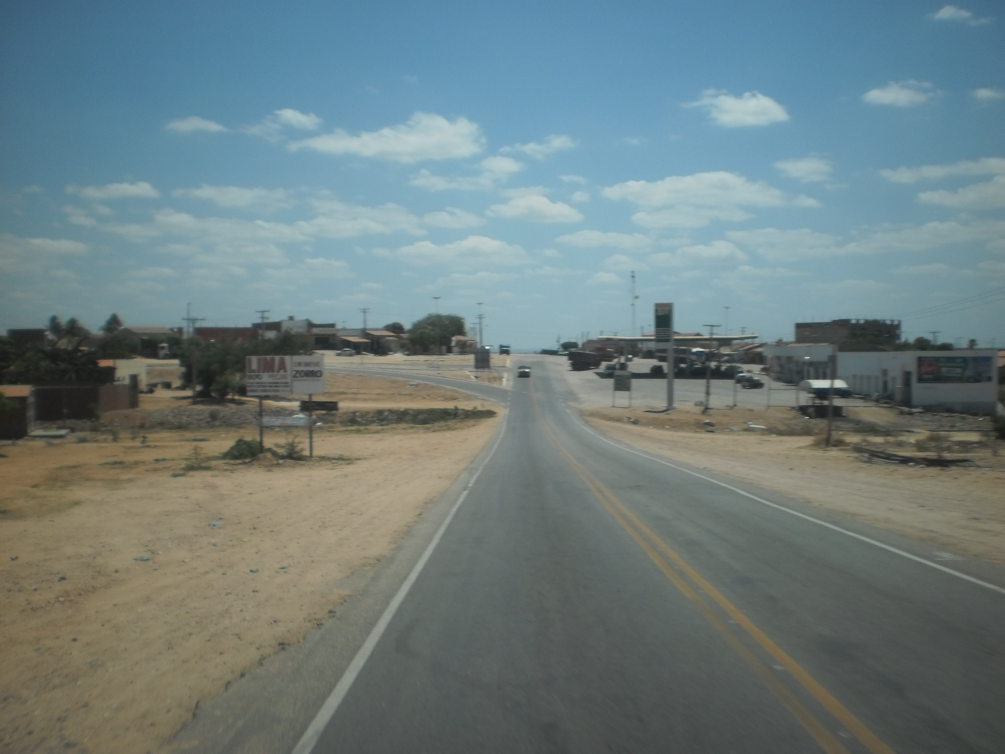 Rodovia BR-316 na entrada de Belém do São Francisco, Pernambuco, Brasil.